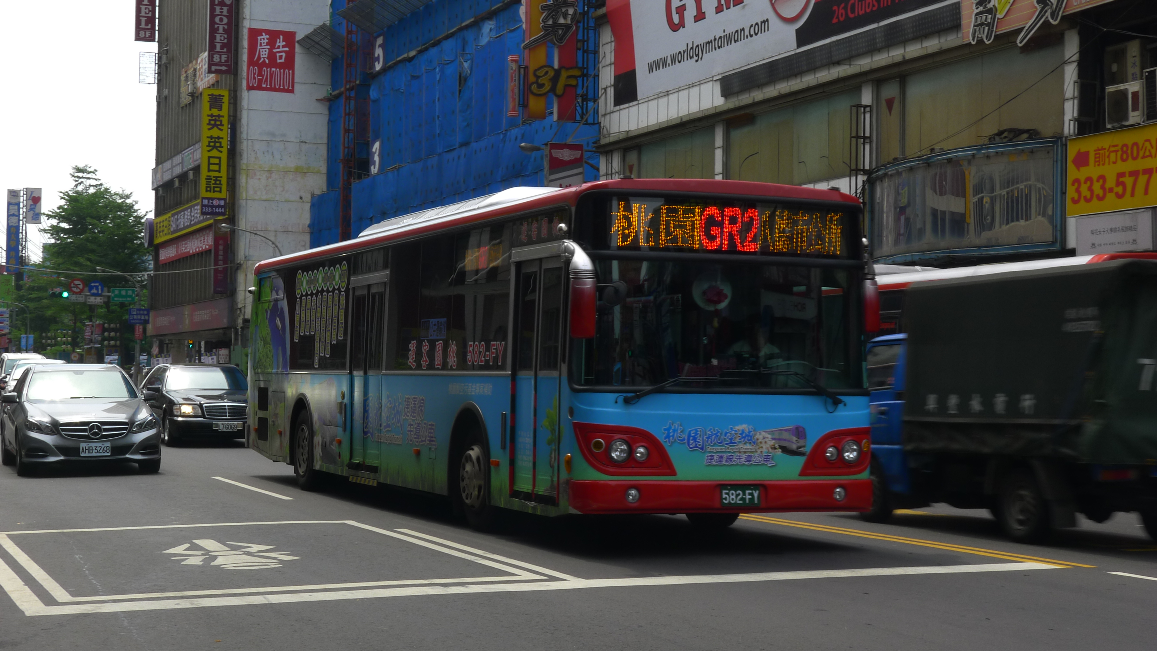 中文（台灣）: 桃園客運大客車582-FY，行駛桃園捷運綠線先導公車GR2線。